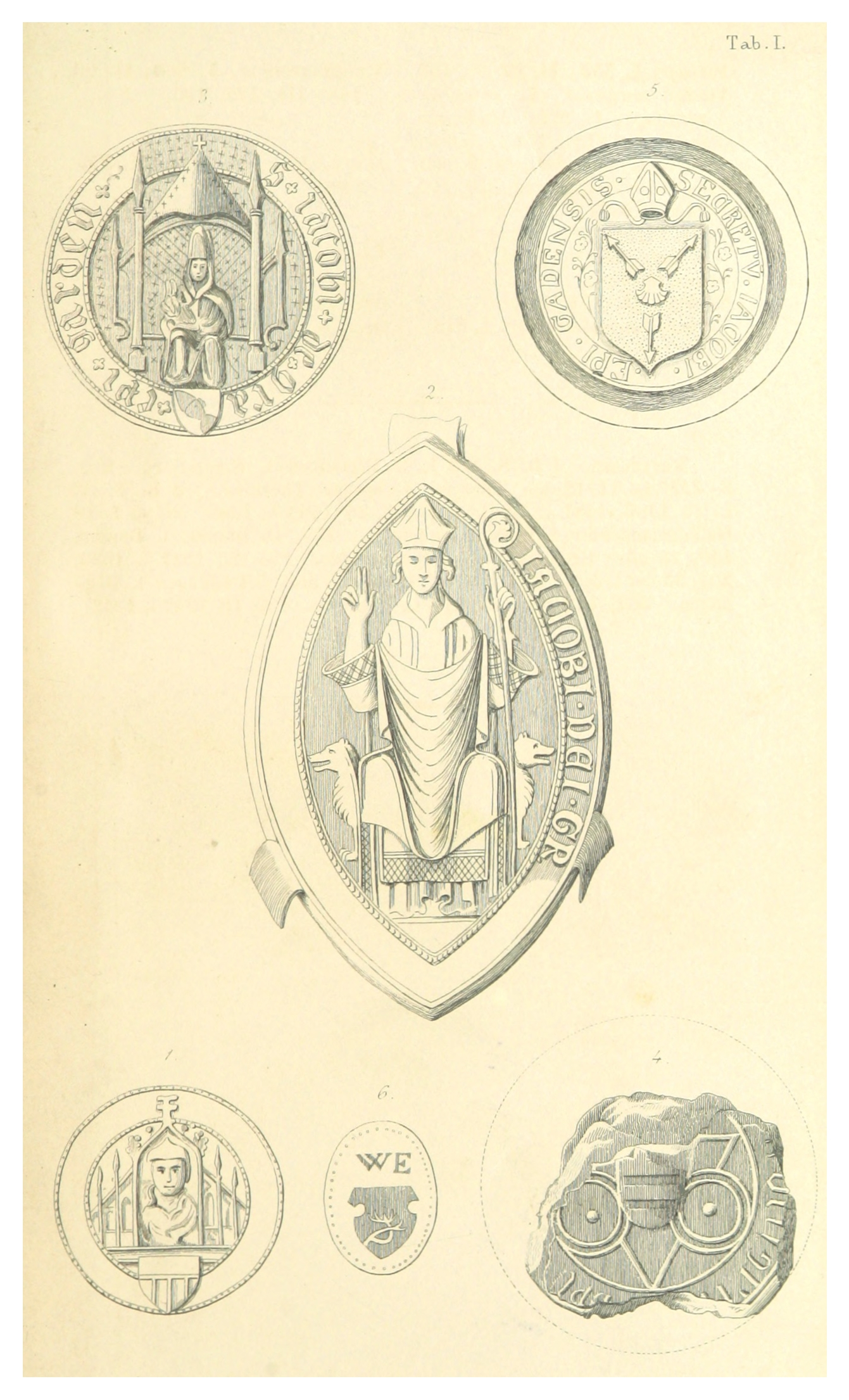 Die ausführliche Original-Beschreibung kann auch in der beigefügten Pdf-Datei gefunden werden, auf Seite 3 Bischof Heinrichs Siegel (1388) Bischof Jakobs Siegel Bischof Jakobs Siegel (1417) Bischof Gregorius Siegel (1450) Bischofs-Siegel an einer Rostocker Urkunde (1487) Bischof Vincentius Siegel (1537)